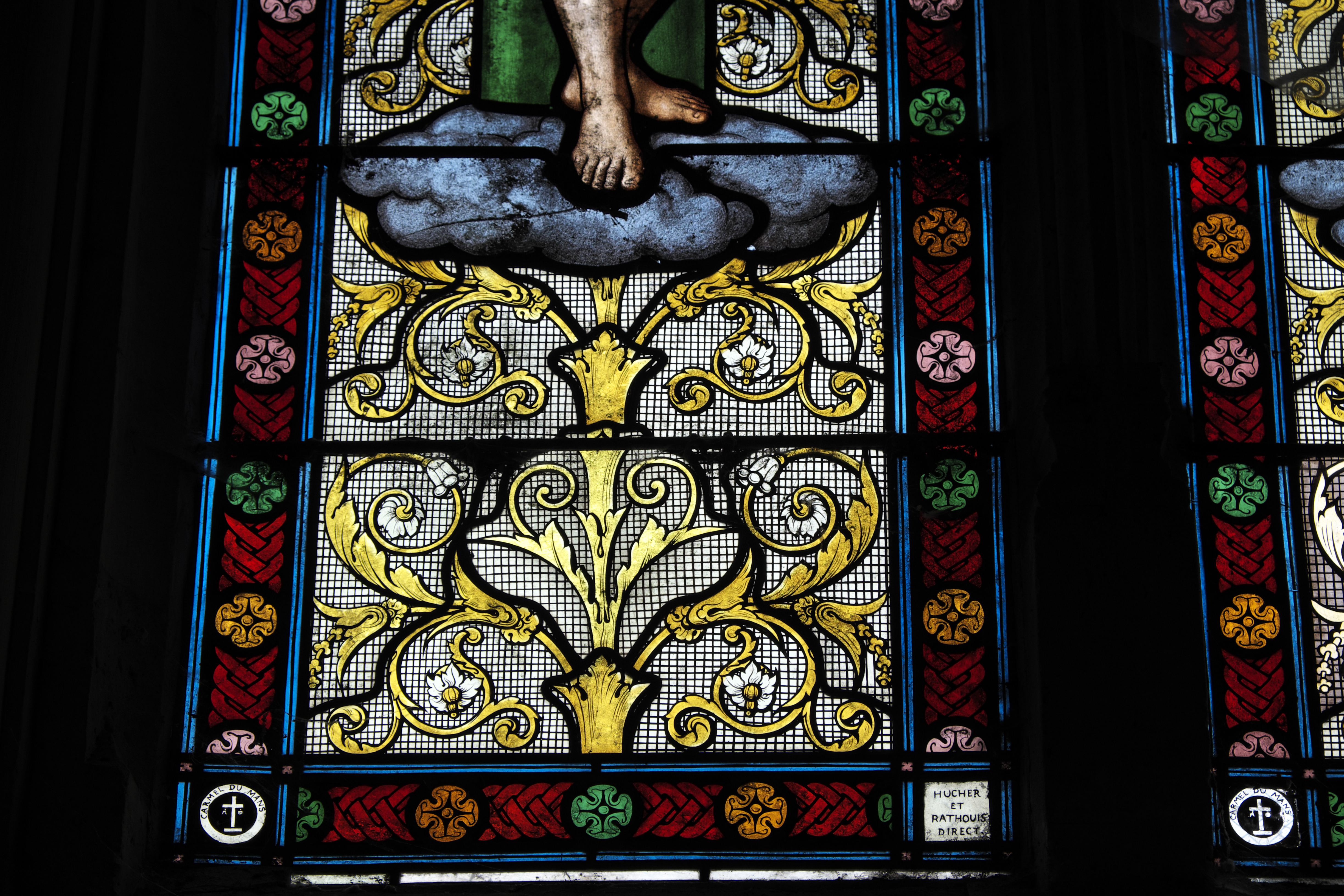 Katholische Pfarrkirche Notre-Dame in Bû im Département Eure-et-Loir (Centre-Val de Loire/Frankreich), Bleiglasfenster (Heilige Sebastian und Barbara) mit Signatur: CARMEL DU MANS HUCHER ET RATHOUIS DIRECT. (Ausschnitt)